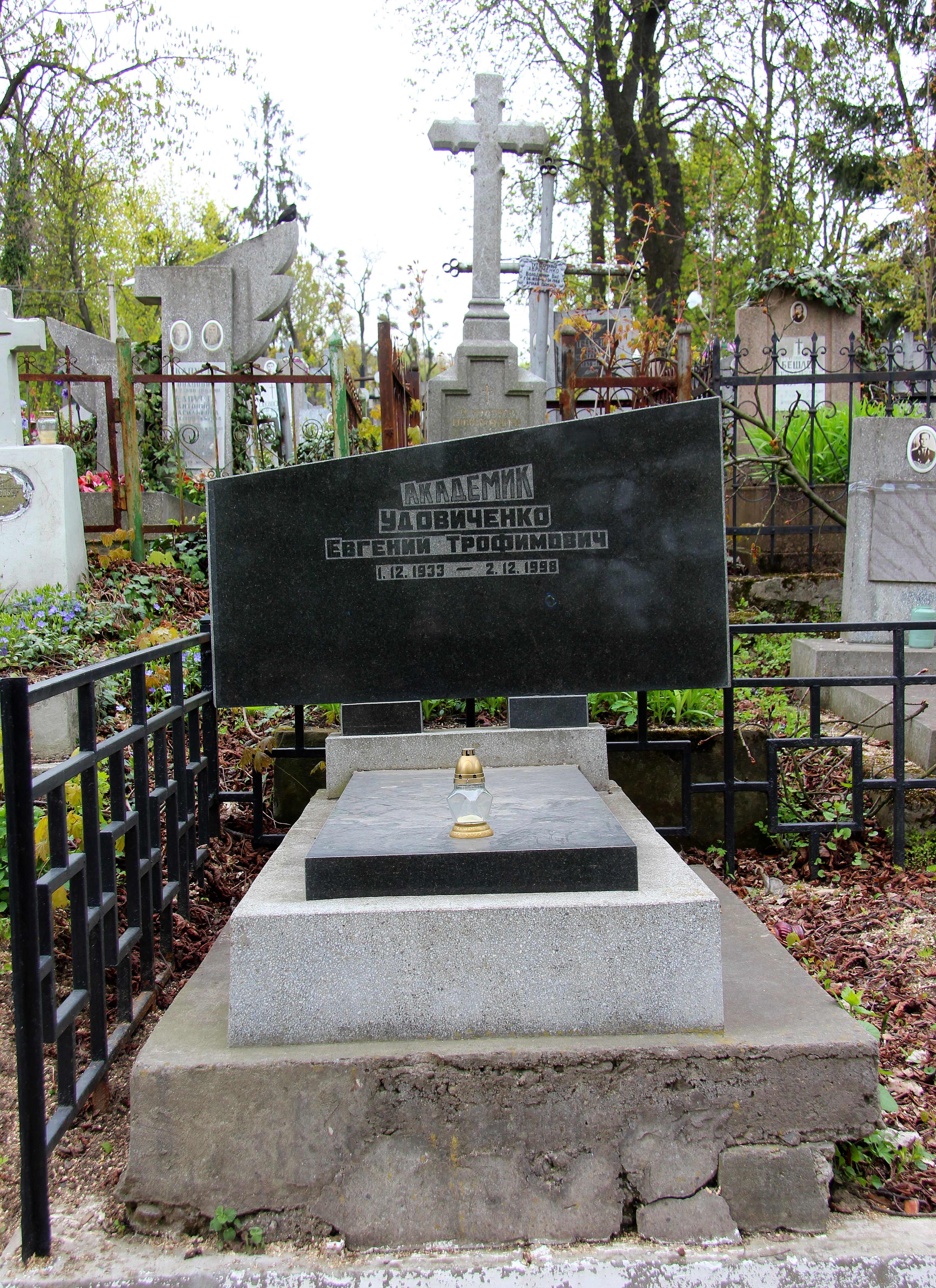 Надгробок на могилі Є. Удовиченка. М.Львів , Янівський цвинтар .